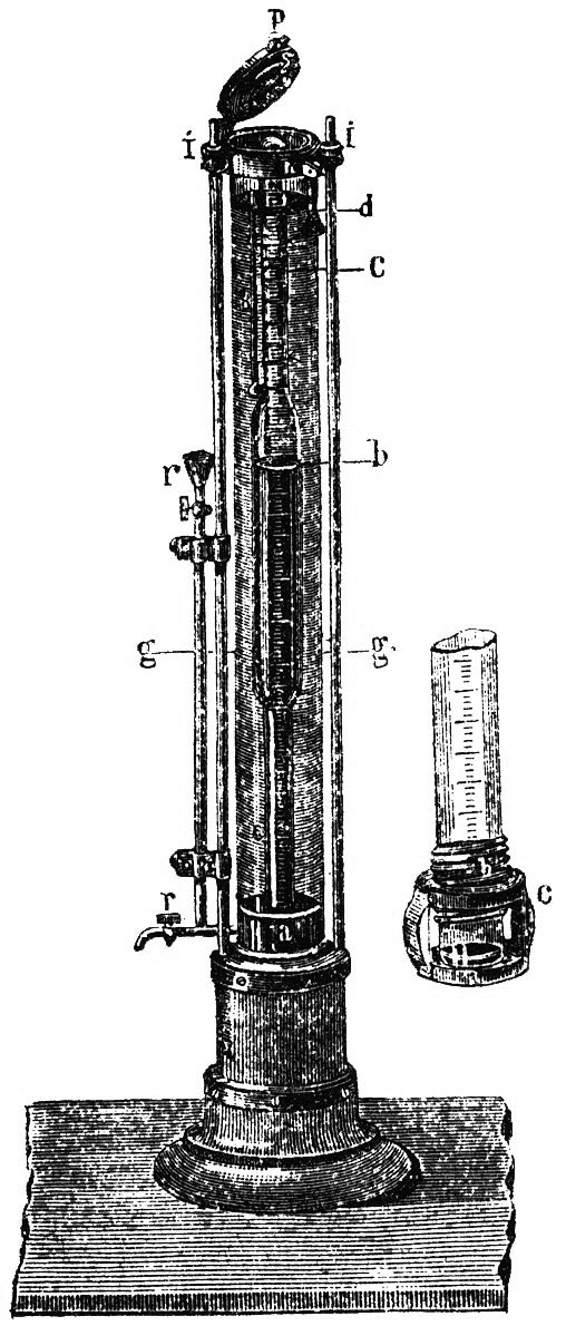 Абсорбциометр Бузена. Данное изображение используется в статье Абсорбциометр. Иллюстрация из энциклопедического словаря Брокгауза и Ефрона (1890—1907). Примечание. Описания изображений были загружены автоматически, возможны неточности. Рекомендуется проверять.